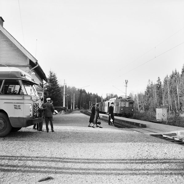 Buss från SRJ:s dotterbolag SLO samt tåg vid Rydbo station.